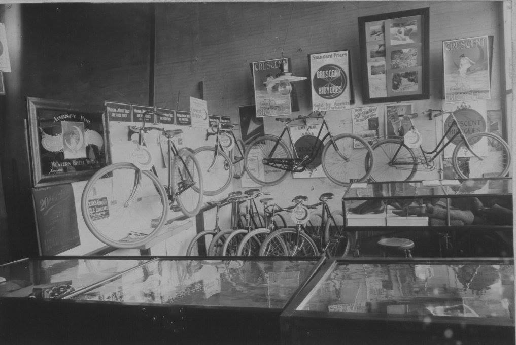 Geschäfts von Elmer Lovejoy in Laramie, Wyoming